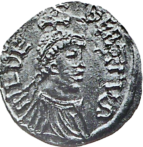 Tiers de sou d'or de Childebert Ier. Bibliothèque nationale.